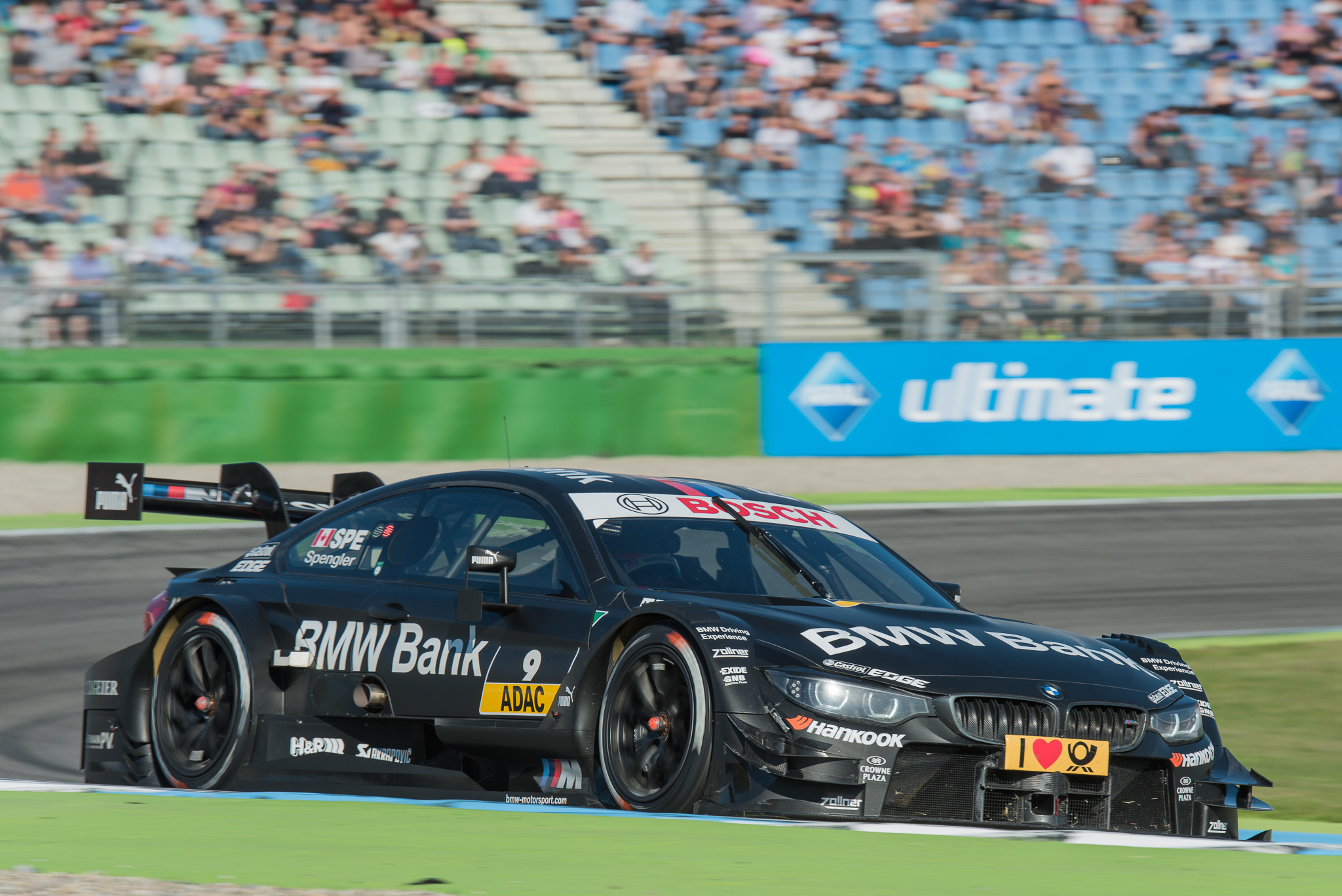 BMW Bank M4 DTM,Bruno Spengler,DTM,Deutsche Tourenwagen Masters,Hockenheimring,Motorsport,Schnitzer Motorsport GmbH